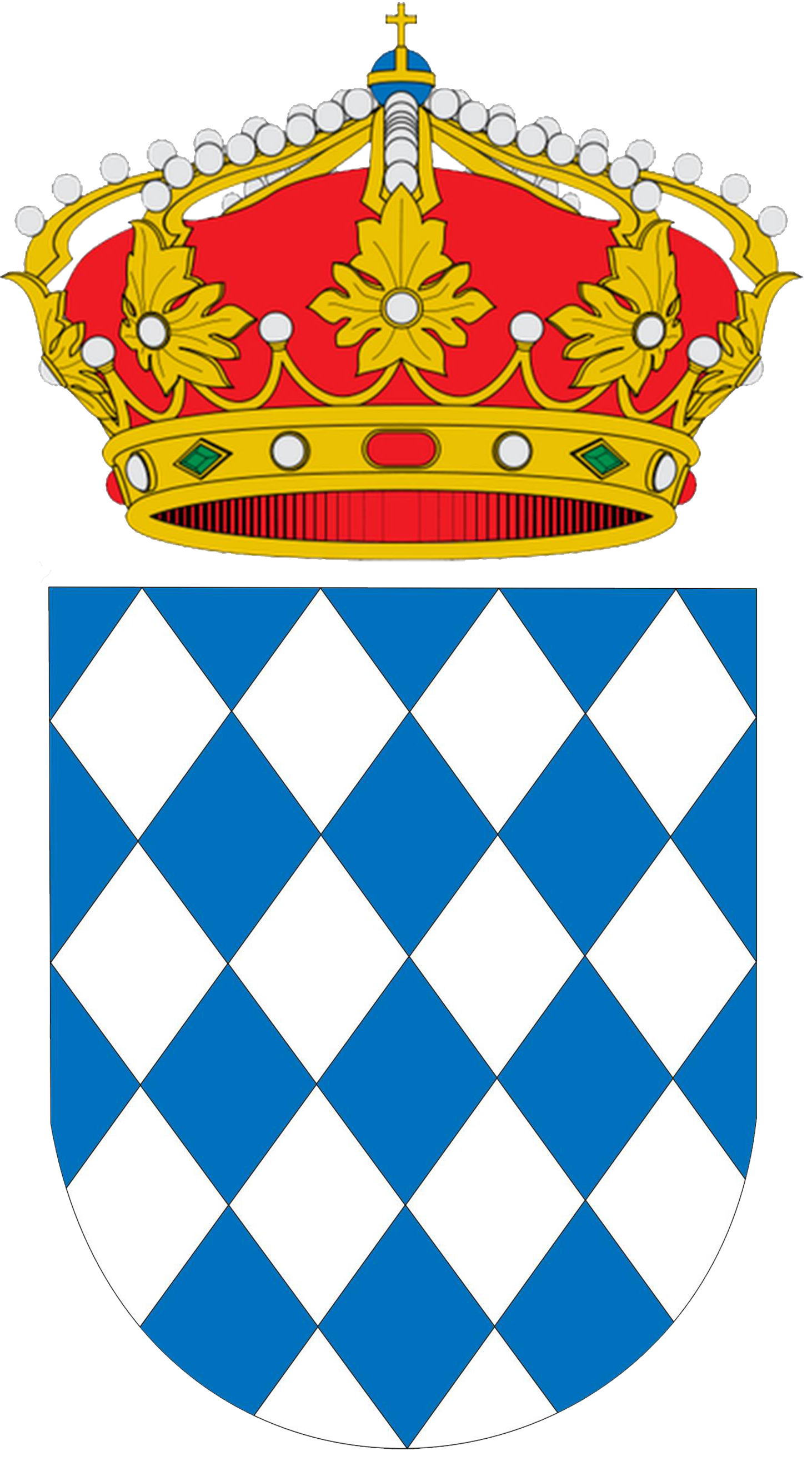 Escudo del municipio de Macael (Almería)